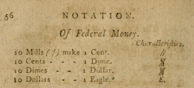 Проекты символов доллара, дайма, цента и милля конца XVIII века